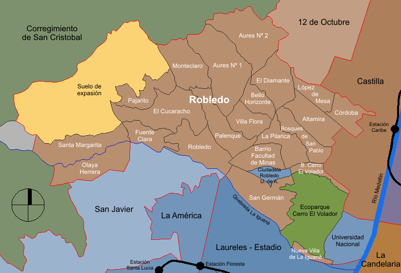 mapa de la división barrial de la comuna Robledo. Medellín, Colombia.